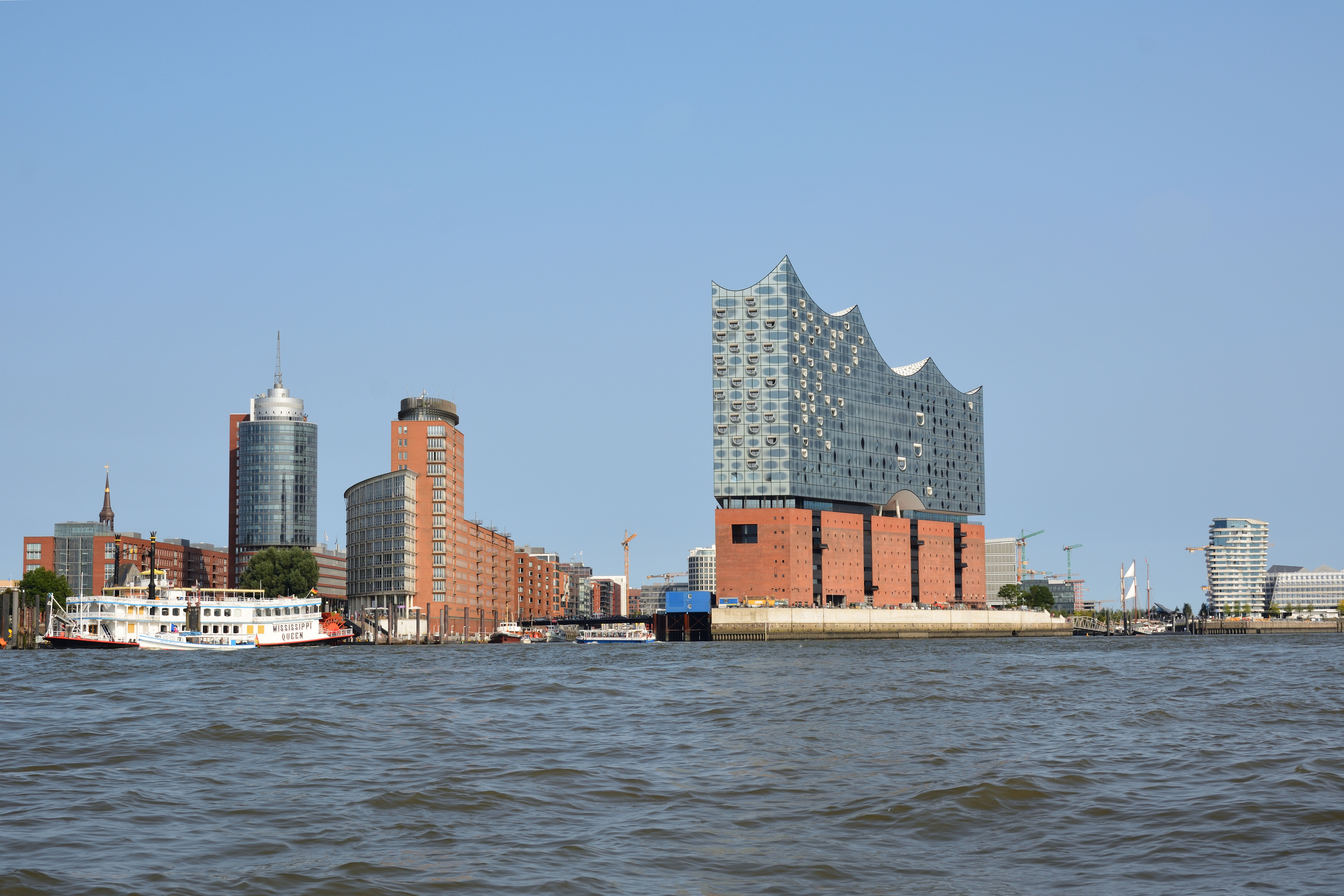 Impressionen einer Barkassenfahrt im August 2016 durch den Hamburger Hafen.